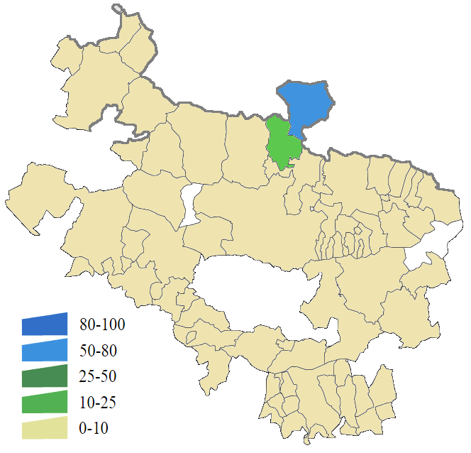 Idioma euskera en Álava (2001)